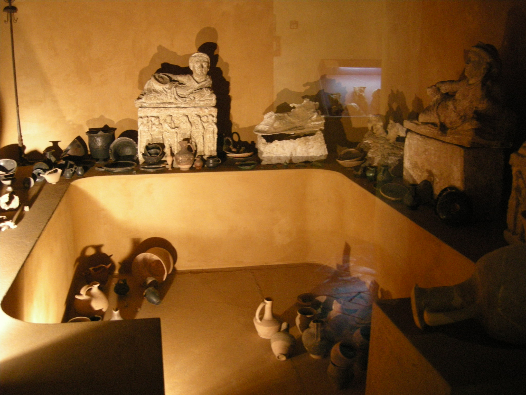 Museo guarnacci, ricostruzione di tomba etrusca